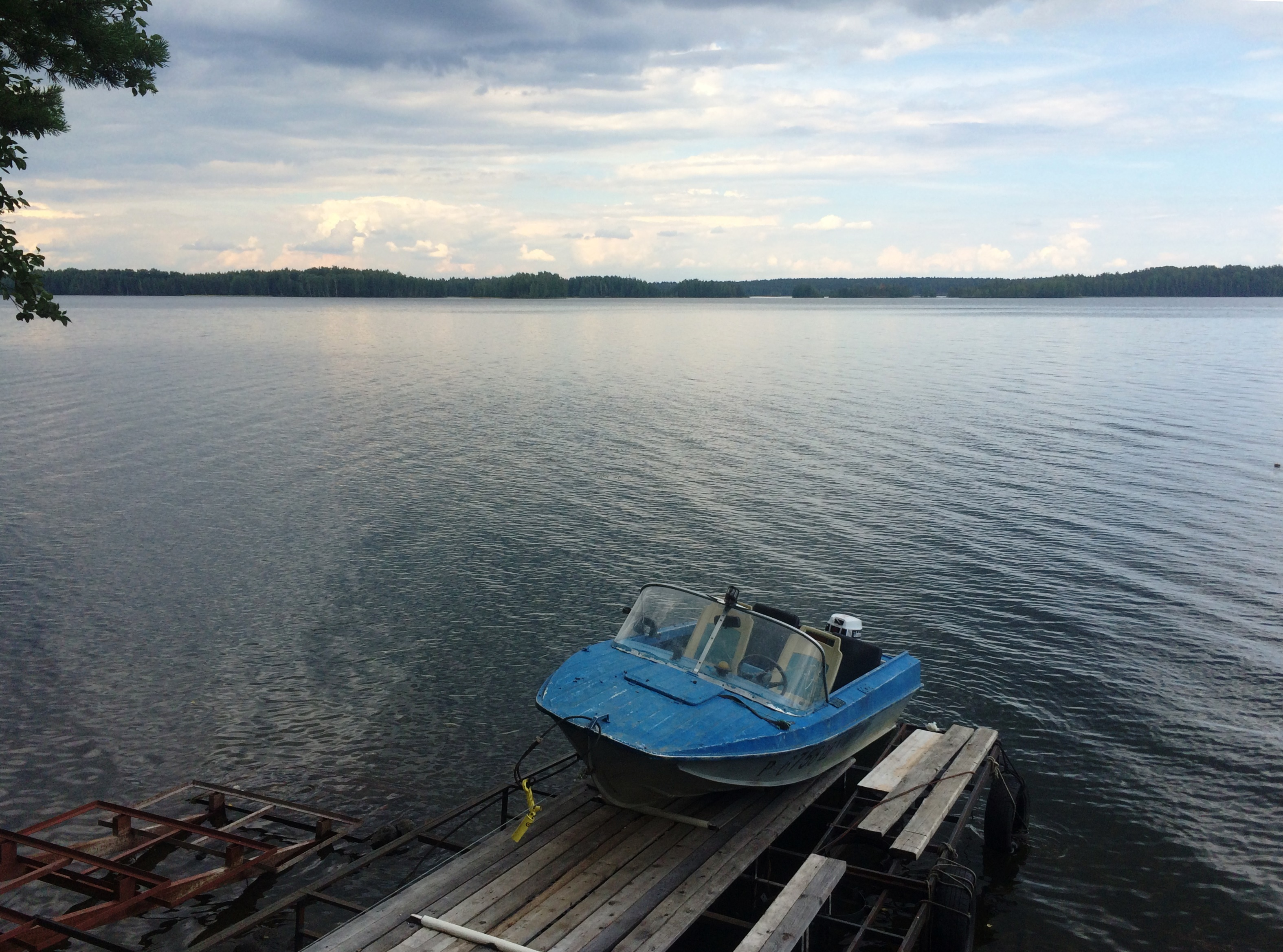 Кончозеро